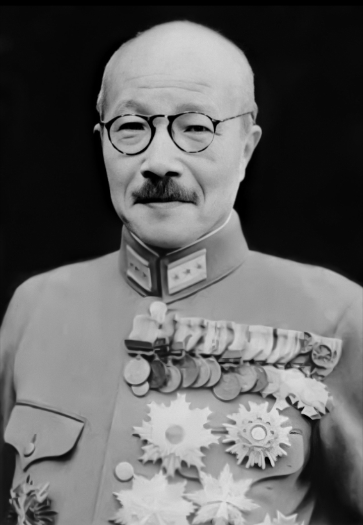 内閣総理大臣